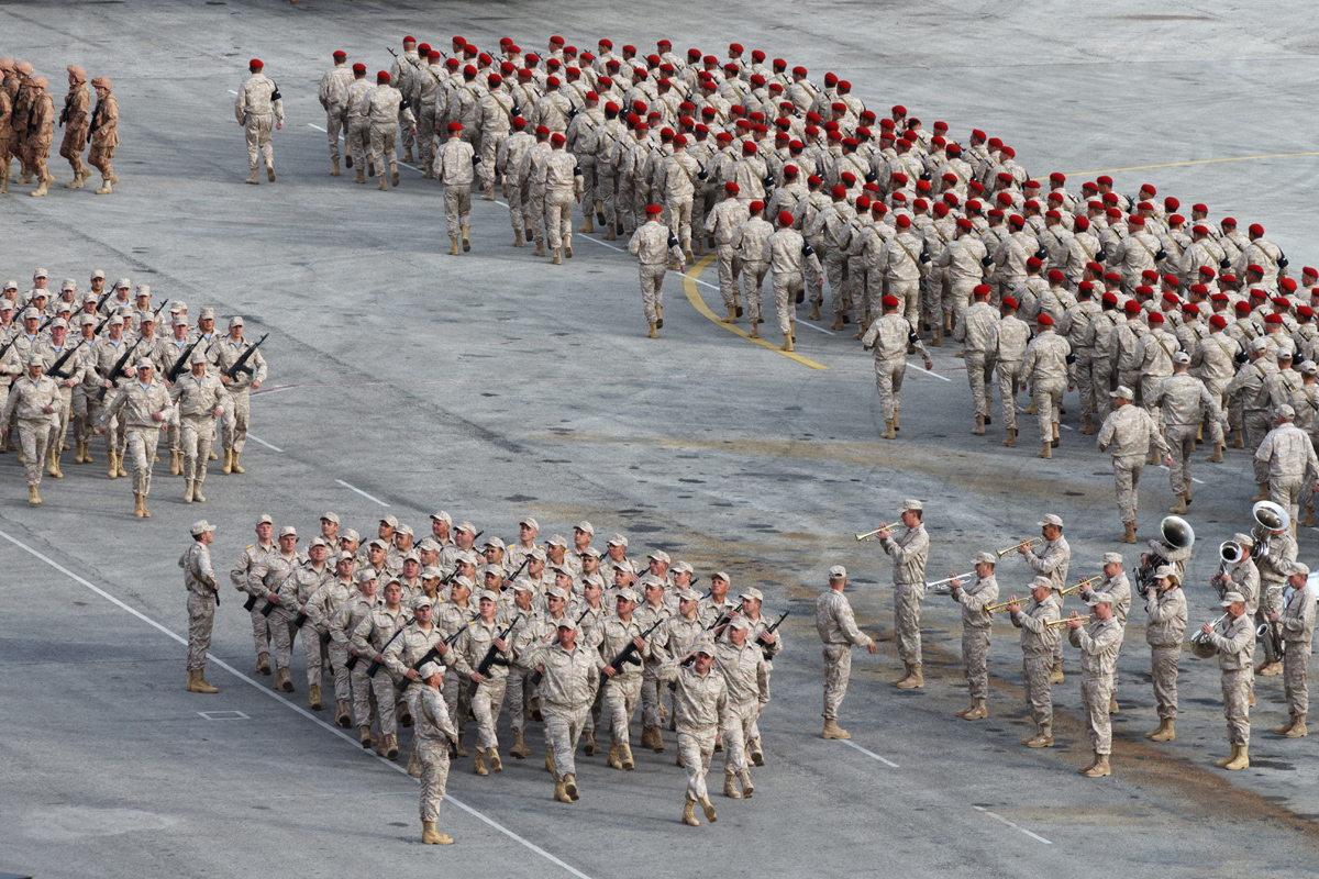 Во время посещения Президентом России Владимиром Путиным авиабазы Хмеймим в Сирии.